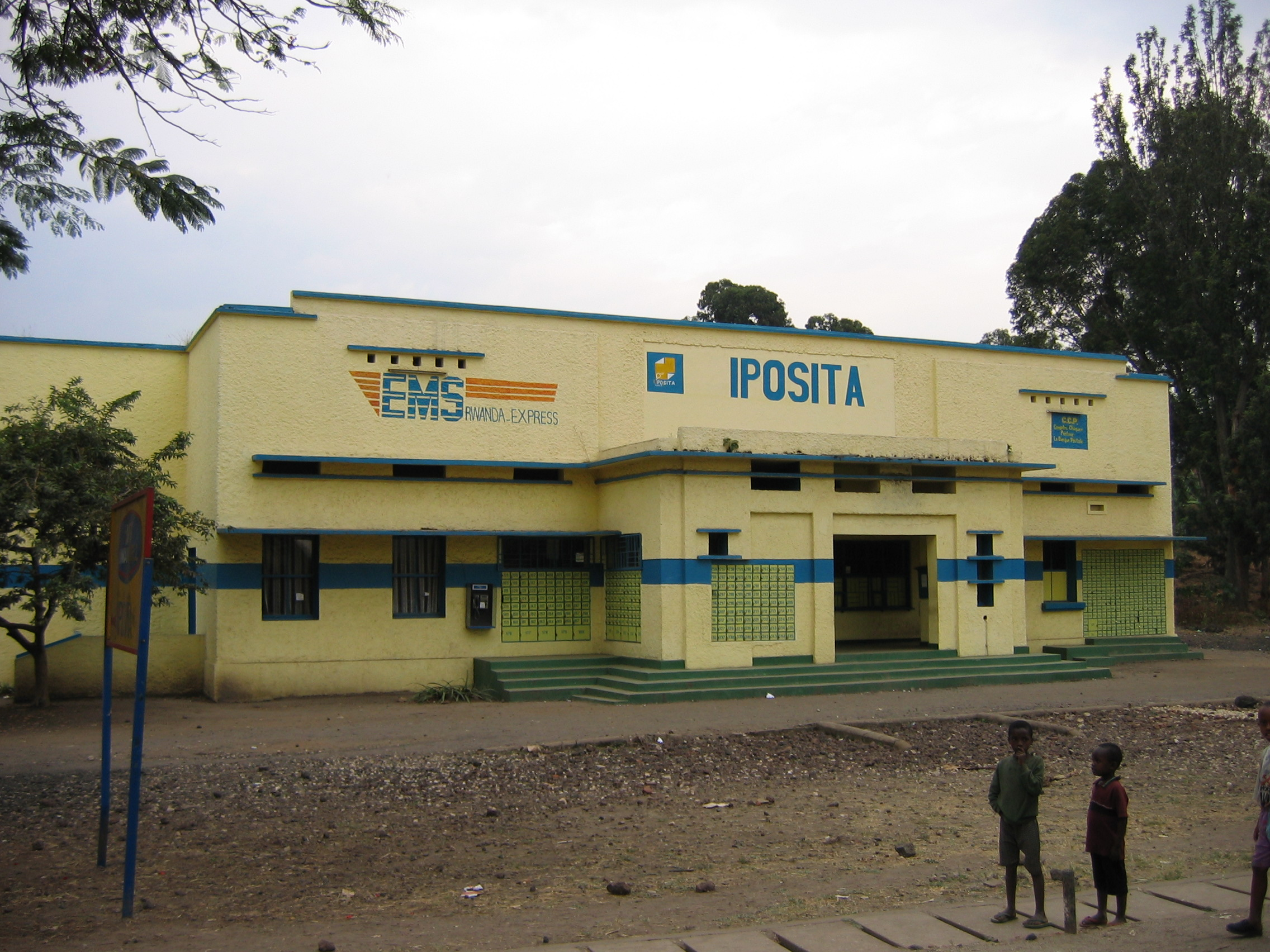 Bureau de poste de Gisenyi, près du lac Kivu. En façade, l'alignement des boîtes postales.